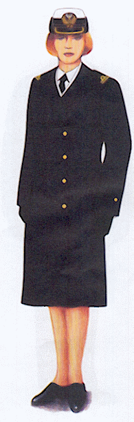 Rysunek ten pochodzi z załącznika do rozporządzenia ministra obrony narodowej z dnia 2 grudnia 2004 r. w sprawie wzorów oraz noszenia umundurowania i oznak wojskowych przez żołnierzy zawodowych i kandydatów na żołnierzy zawodowych.